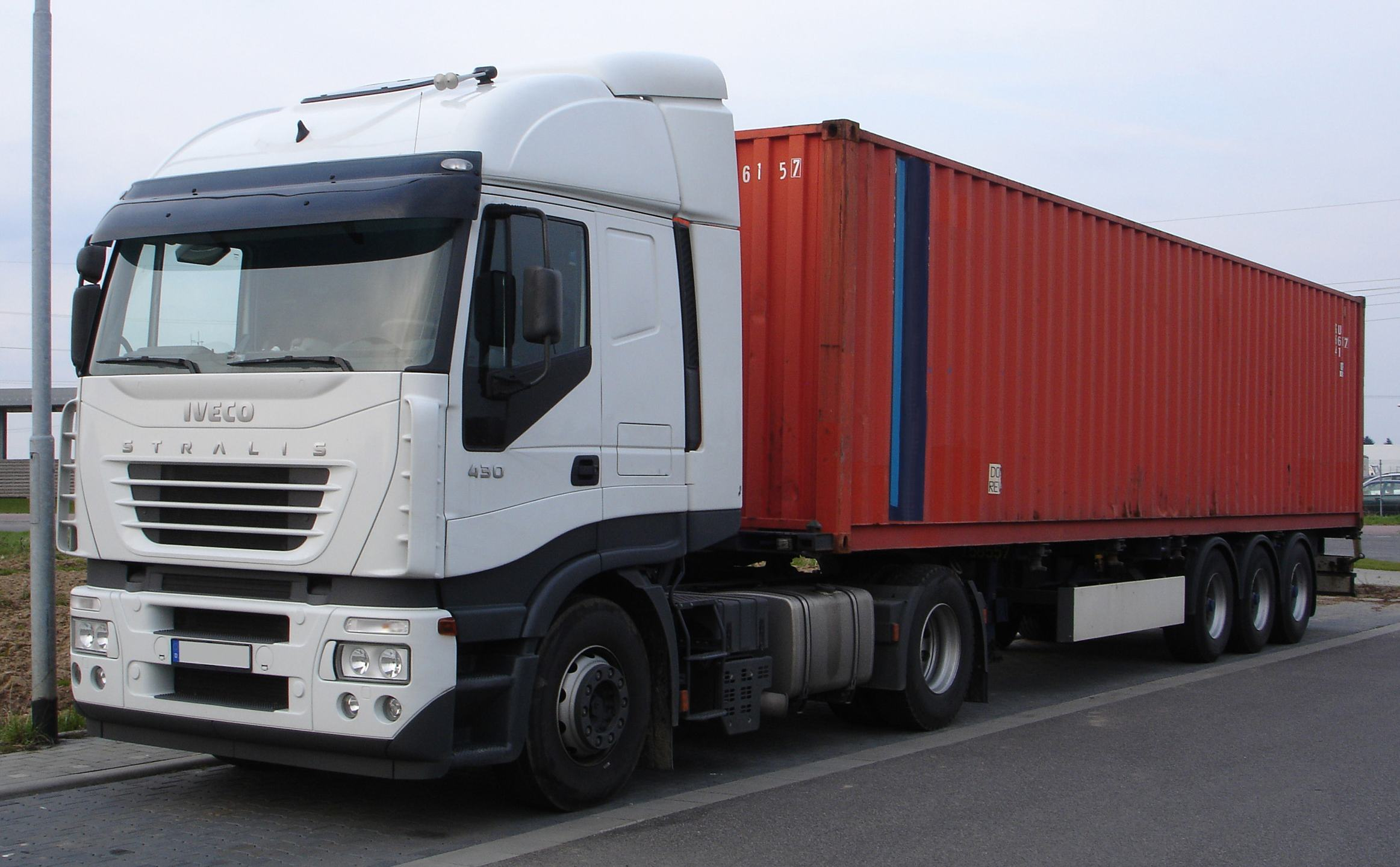 IVECO Stralis AS430 Containersattelzug